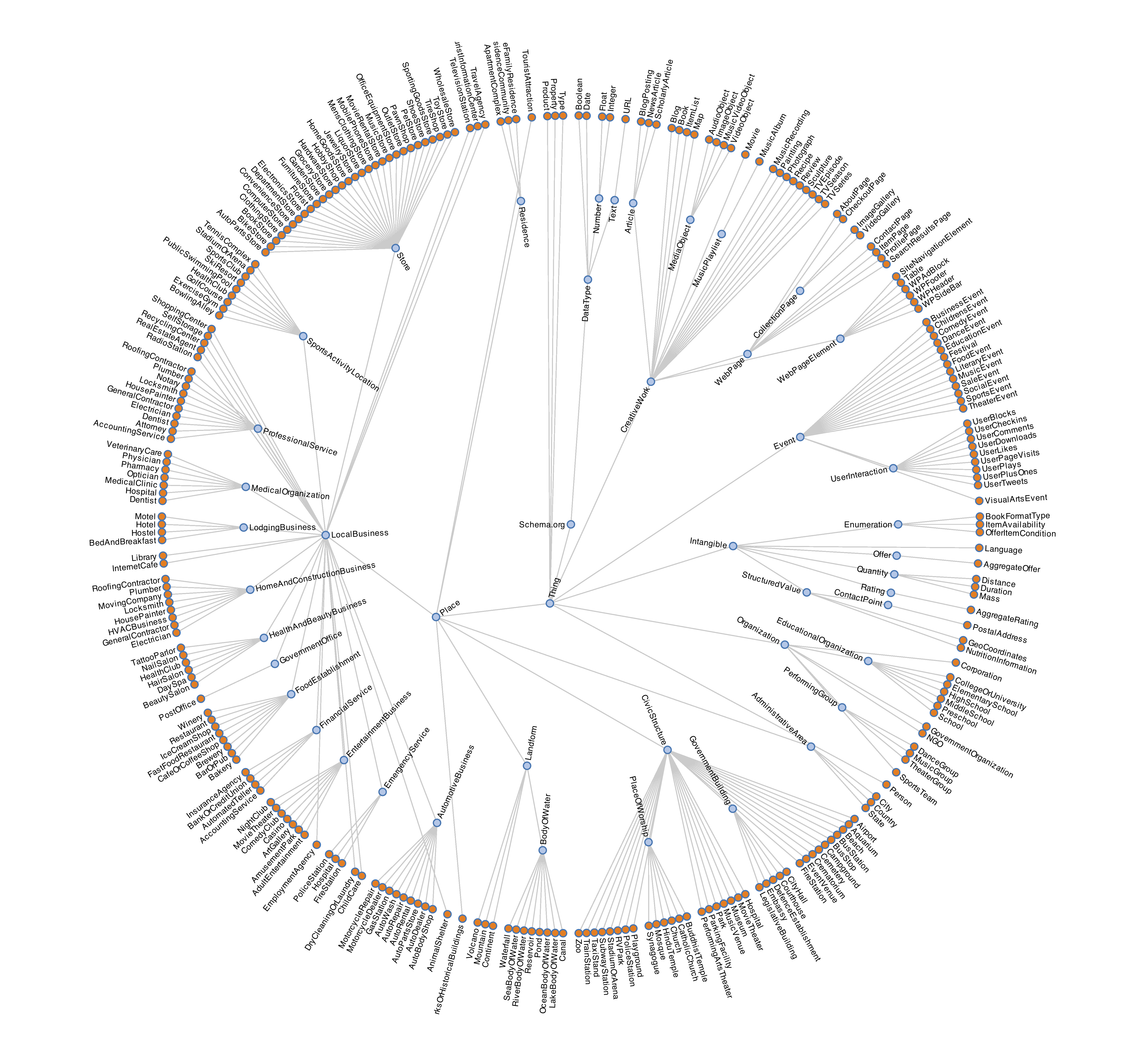 mapping by Dan Brickley